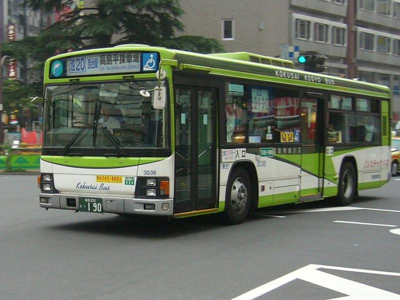 登録番号 練馬200か・190 国際興業バス志村営業所所属 車番3036 2006年6月21日 池袋駅西口にて撮影